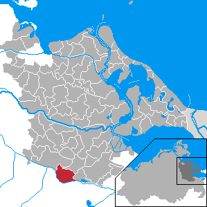 Boldekow, Landkreis Ostvorpommern, Mecklenburg-Vorpommern